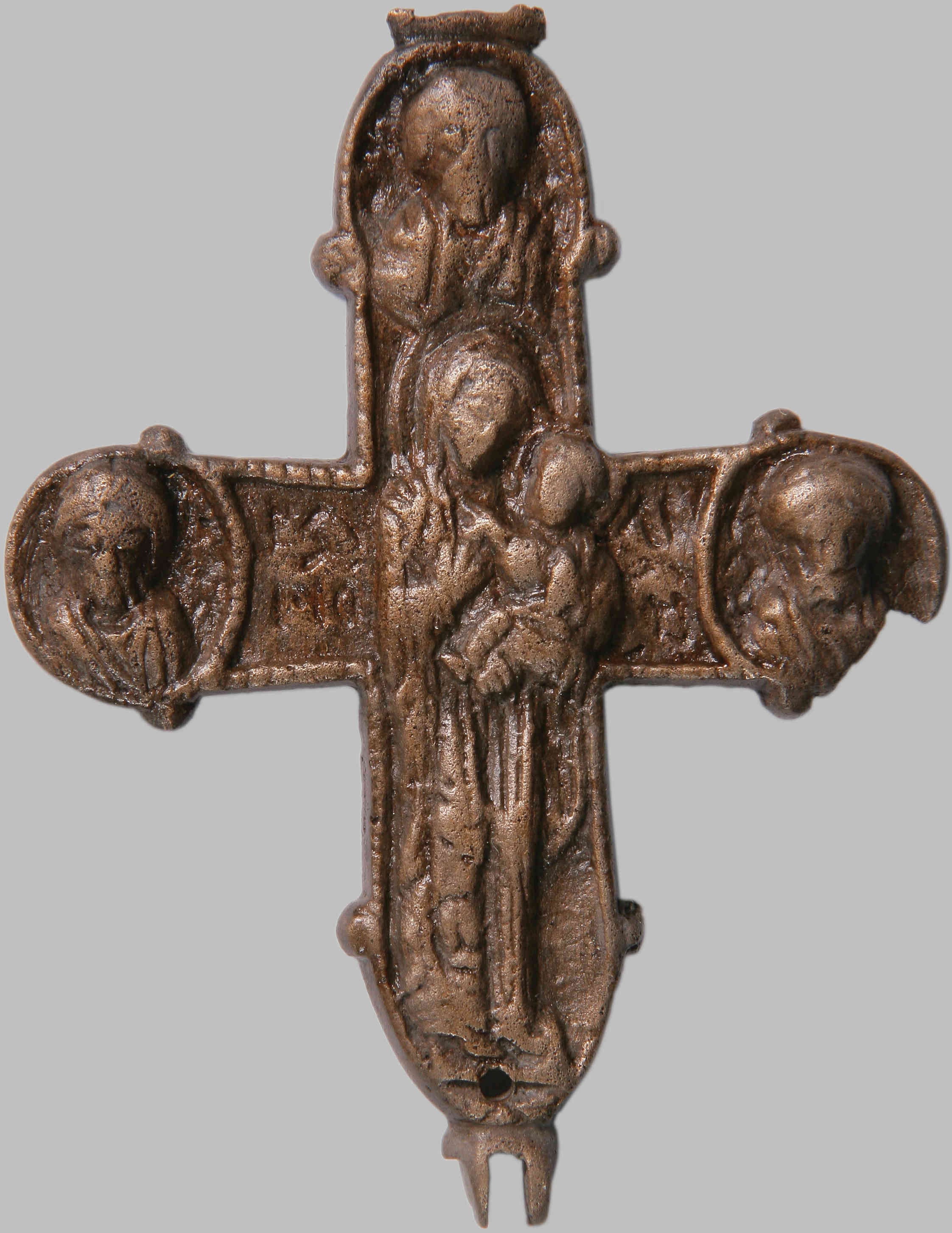 8,8×8×0,6 см